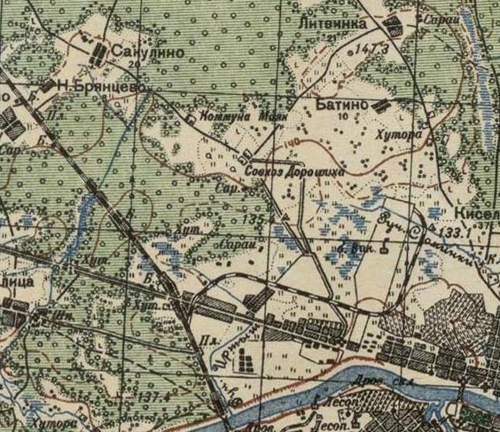 Фрагмент карты 1930-х годов. Северо-запад г.Калинина.